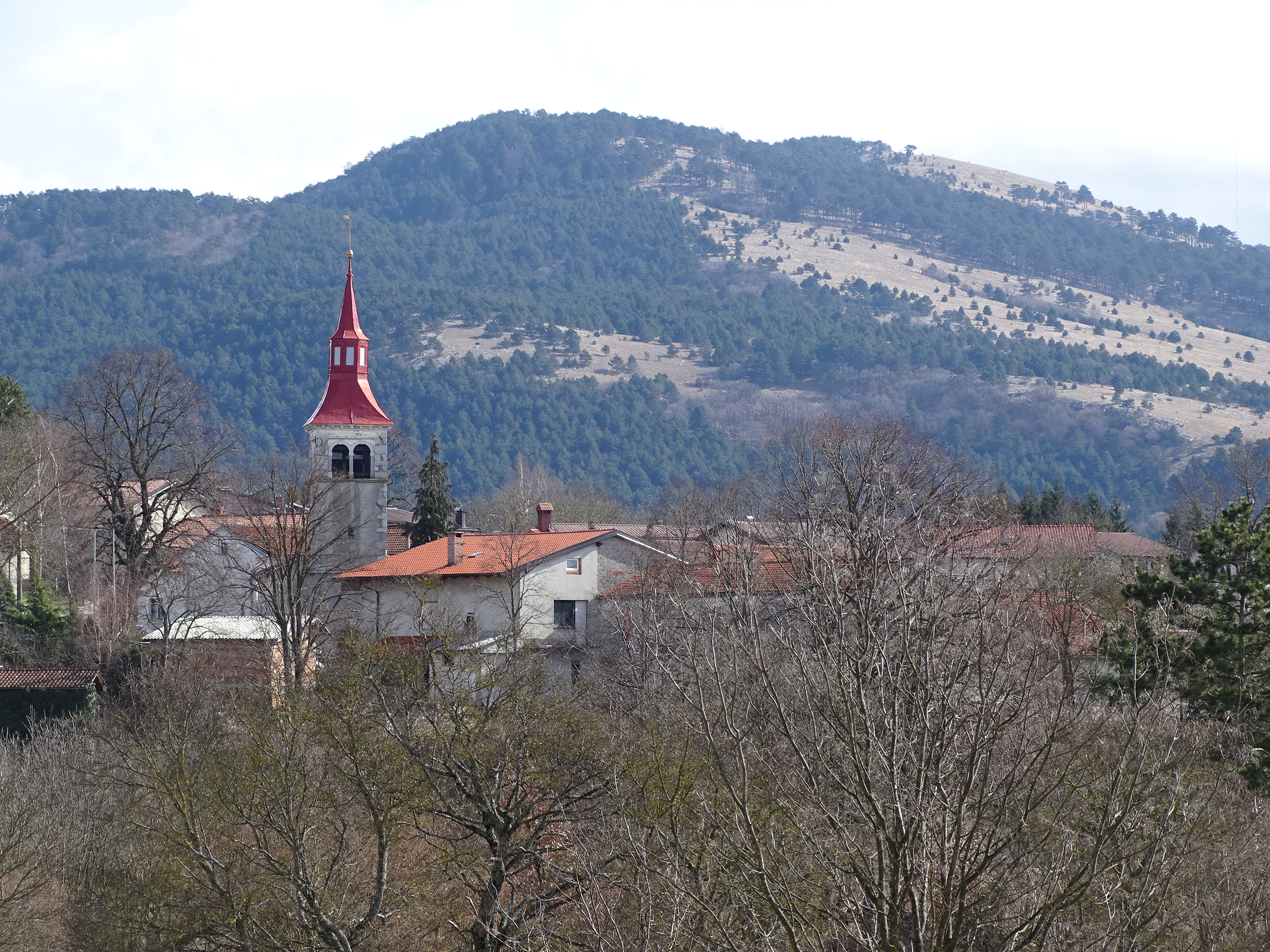 Il paesetto di Šembije in Krain